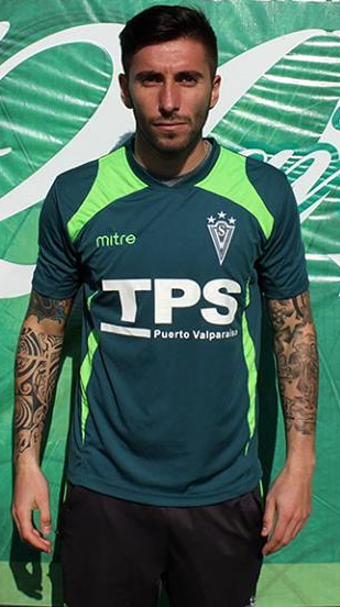 Edición de la fotografía "MarcoMedel.jpg", que muestra al jugador de fútbol Marco Medel.